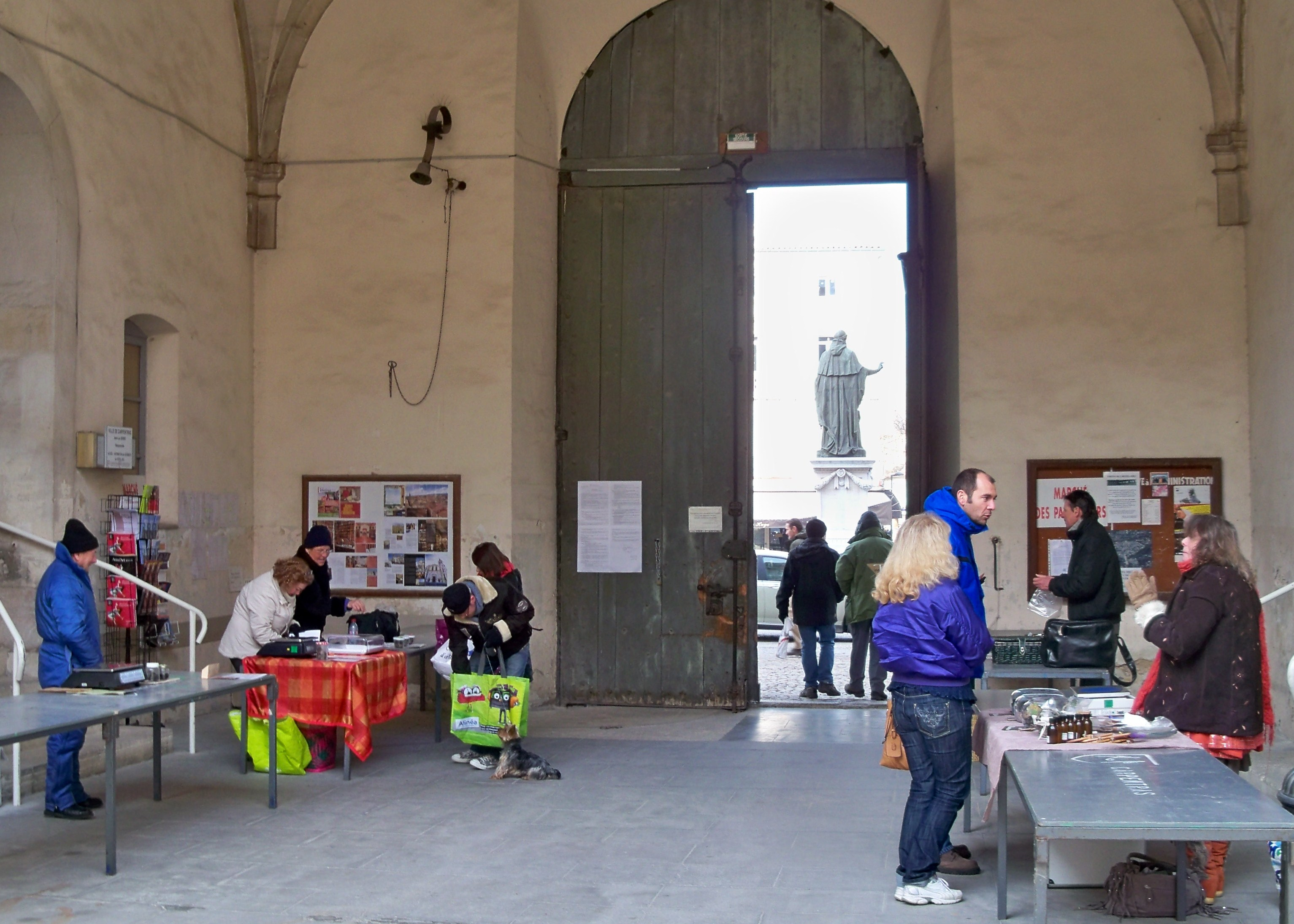 Stands du marché hebdomadaire aux truffes, à Carpentras (84)